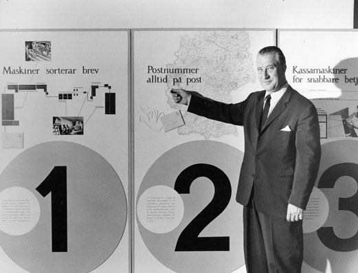 Generaldirektör Nils Hörjel presenterar punkt nr. 2 i 8-punktsprogrammet. Punkt nr. 2 är postnummerreformen.